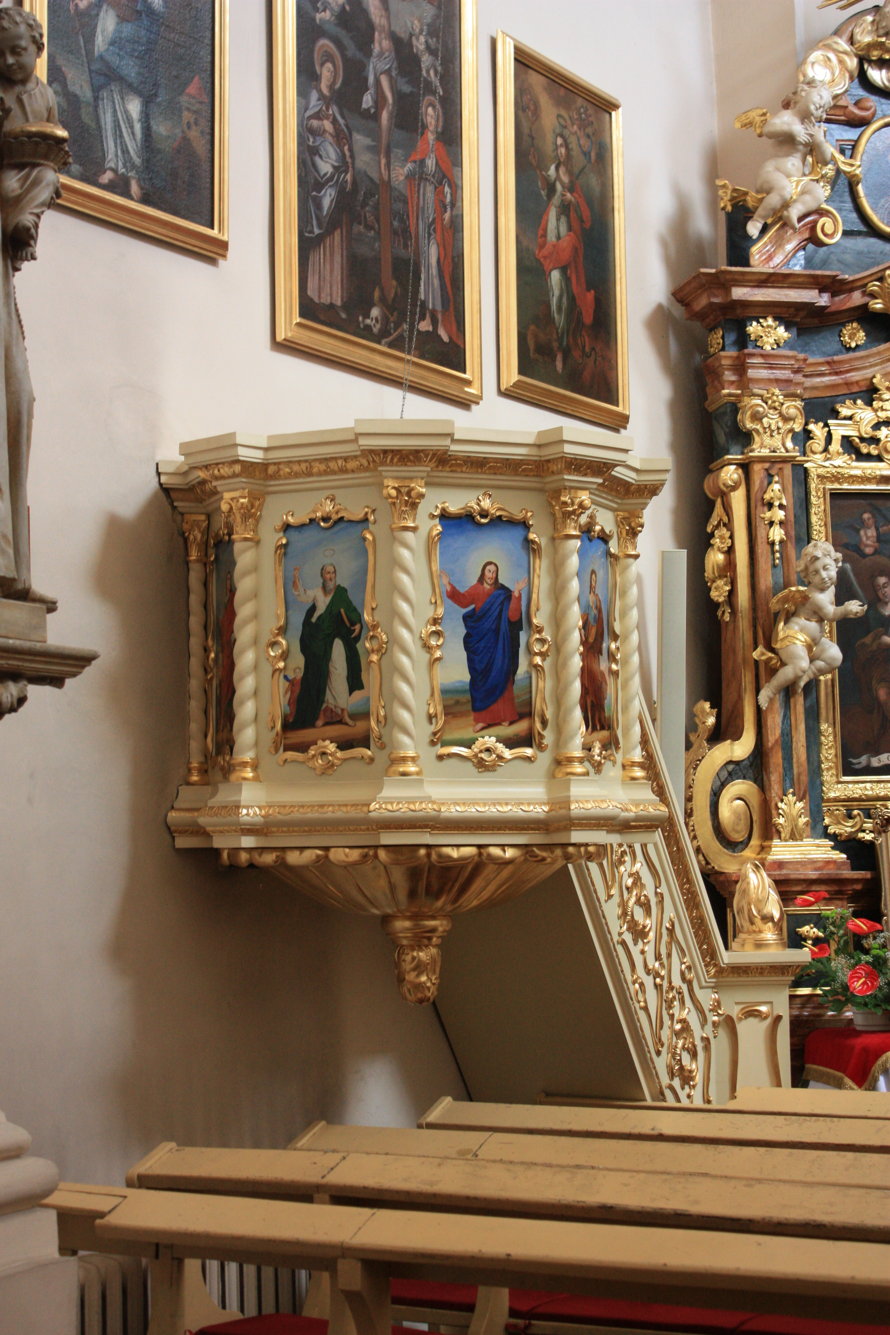 Kościół Najświętszej Krwi Pana Jezusa w Poznaniu. Ambona.